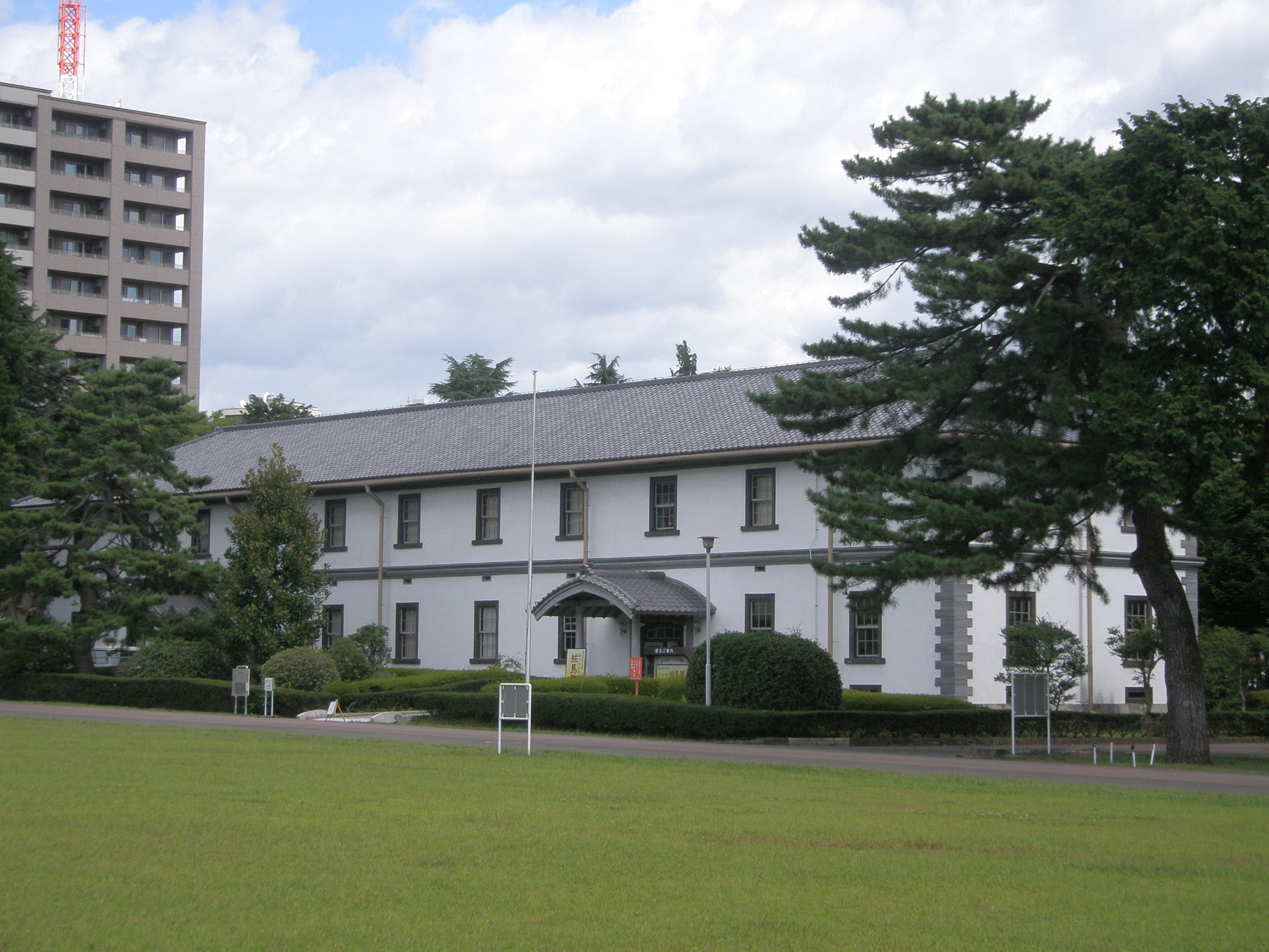 仙台市歴史民俗資料館（仙台市宮城野区、榴岡公園内）